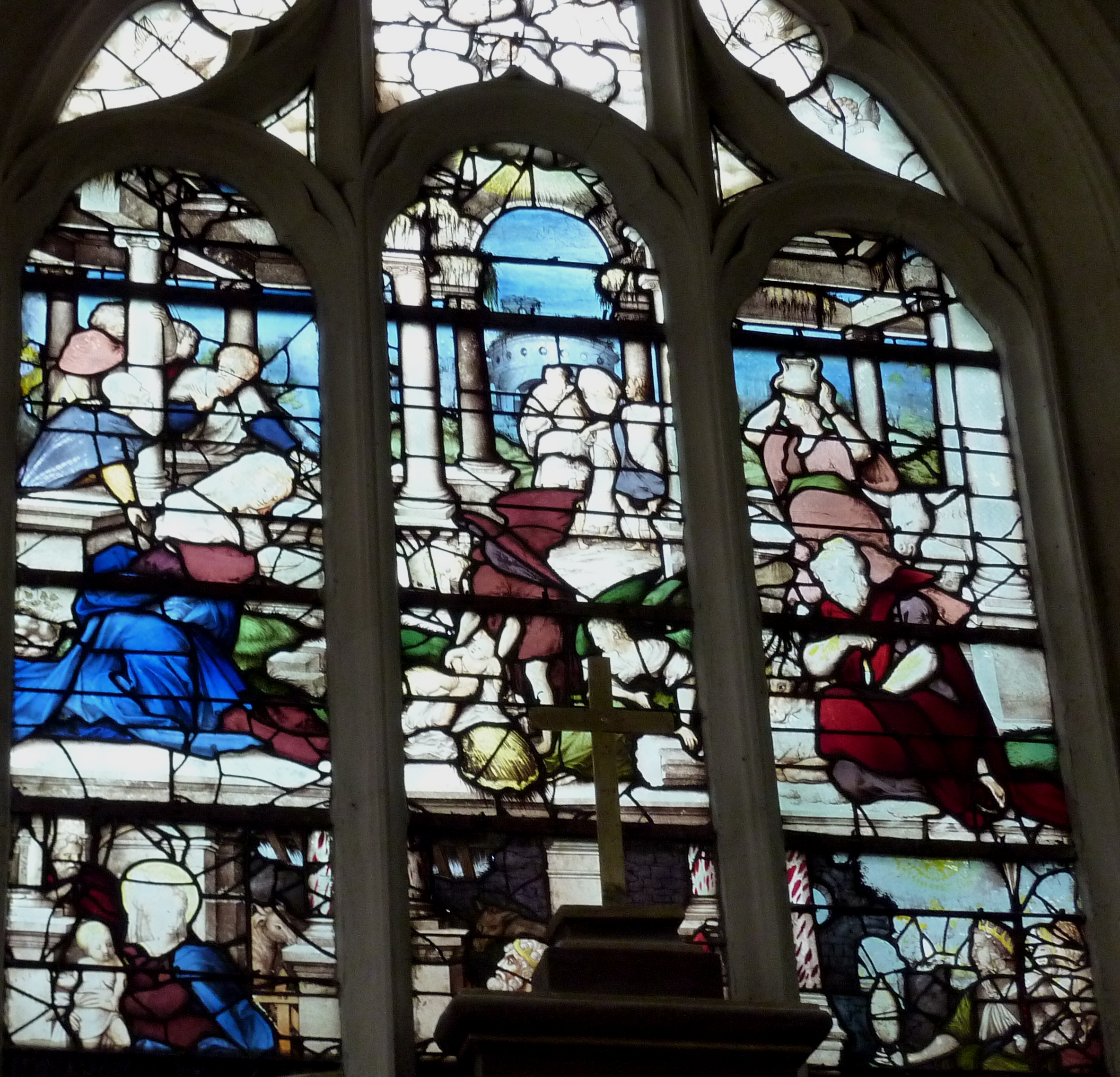 Ausschnitt des Bleiglasfensters Nr. 3 in der katholischen Pfarrkirche Saint-Acceul in Écouen (siehe Mathieu Lours: Saint-Acceul d'Écouen. Une cage de verre en pays de France, éditée par l’Association Les Amis de Saint-Acceul)